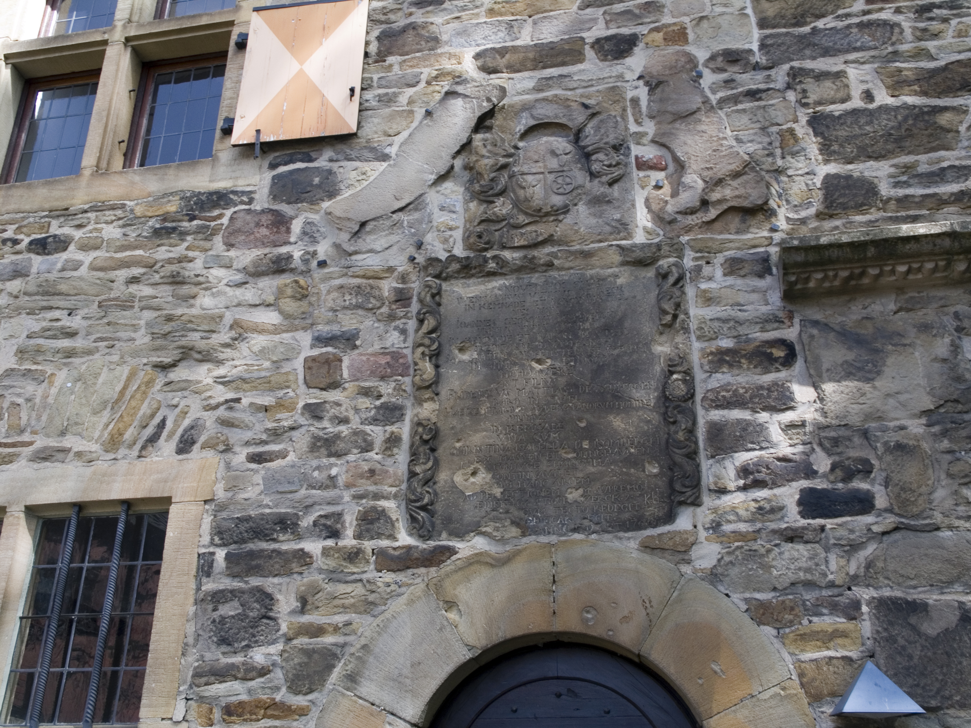 Северный Рейн - Вестфалия, Хаттинген. Замок Кемнаде